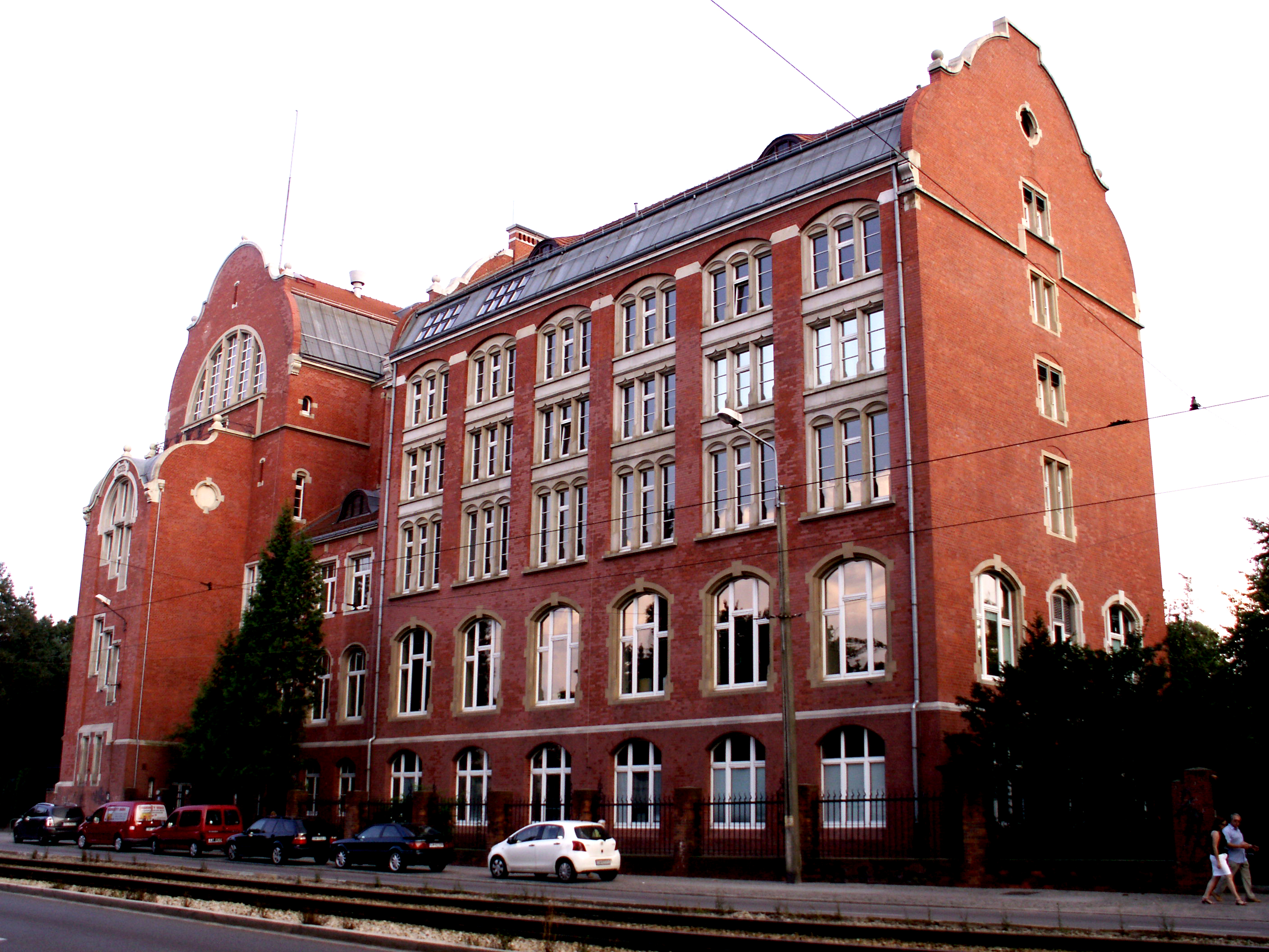 Wrocław, Instytut Zoologii UW, 1902